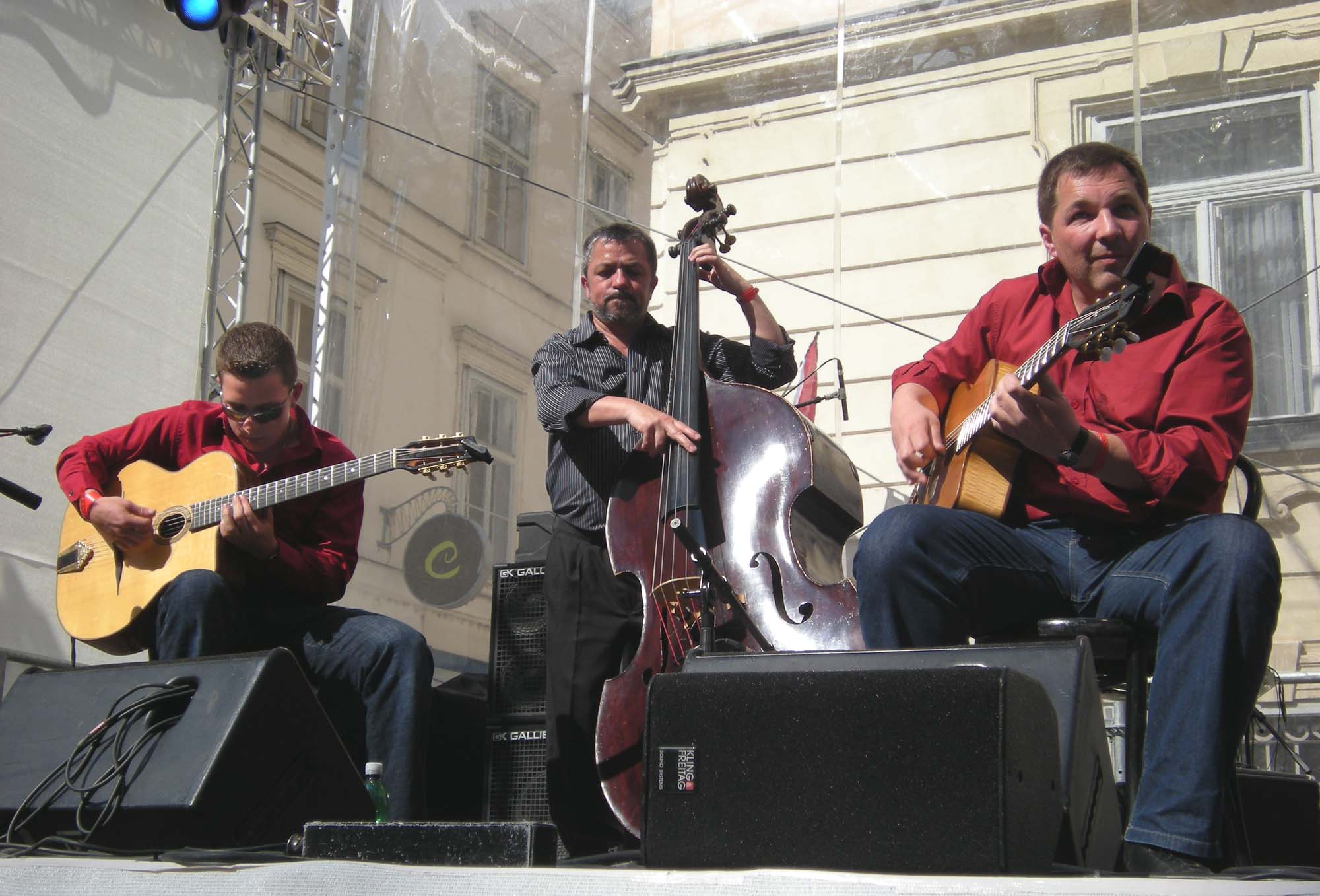 Diknu Schneeberger Trio performing at Vienna's annual Stadtfest. From left: Diknu Schneeberger, guitar. Joschi Schneeberger [Diknu's father], bass. Martin Spitzer, guitar. Note: Camera time is set to UTC, which is local time -2.